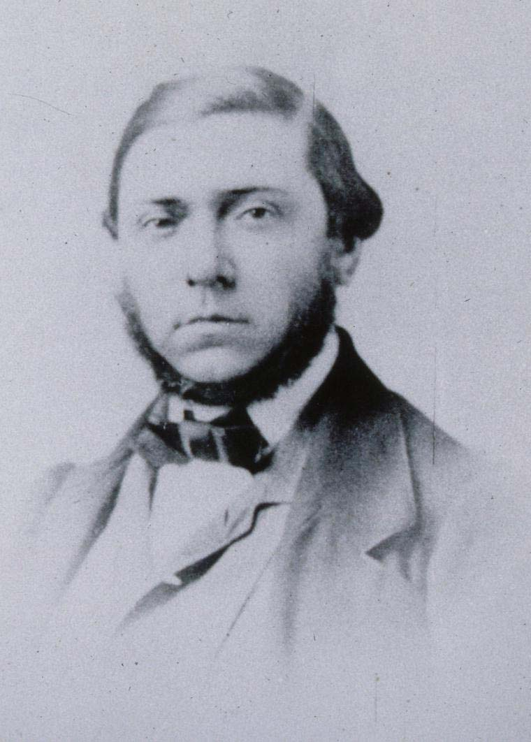 Portrait du théologien Timothée Colani datant des années 1910, d'après une photographie qui se trouve à la sacristie de l'église Saint-Nicolas à Strasbourg - coll. BNUS